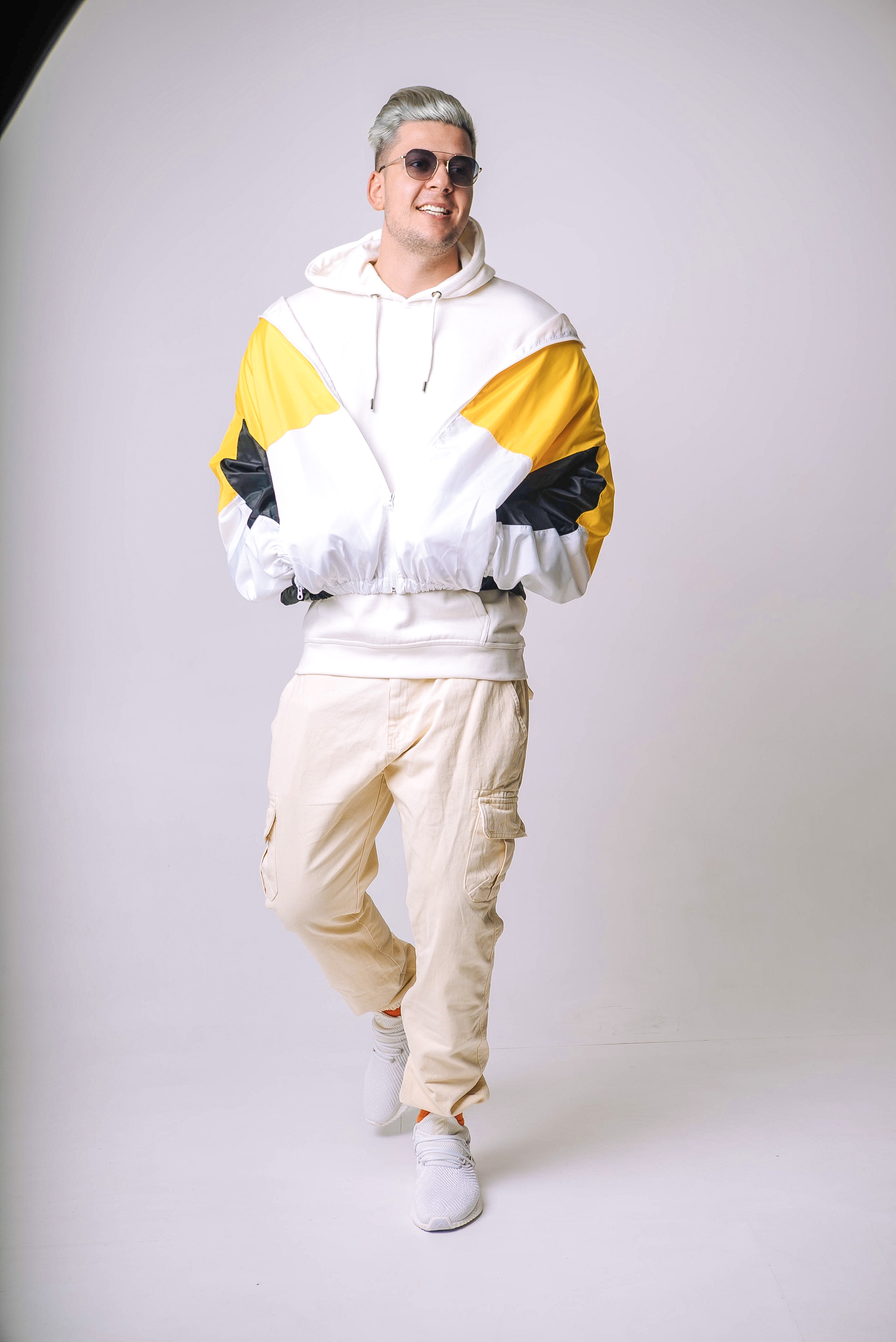 PRESTO beim Shooting zur neuen Single 2019